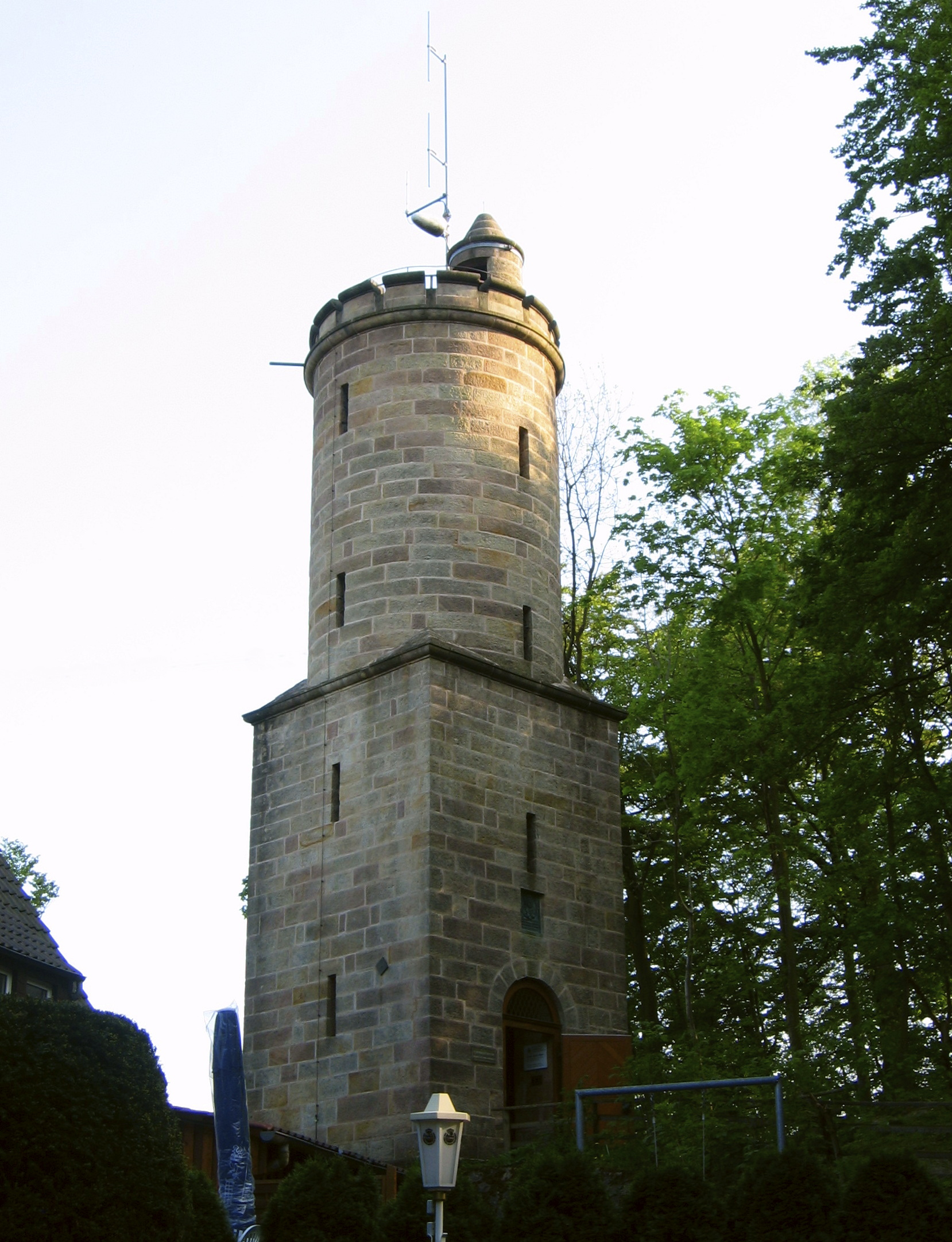 Der 1904 errichtete Kaiser-Karls-Turm in Bad Driburg, links ein Teil der „Sachsenklause“